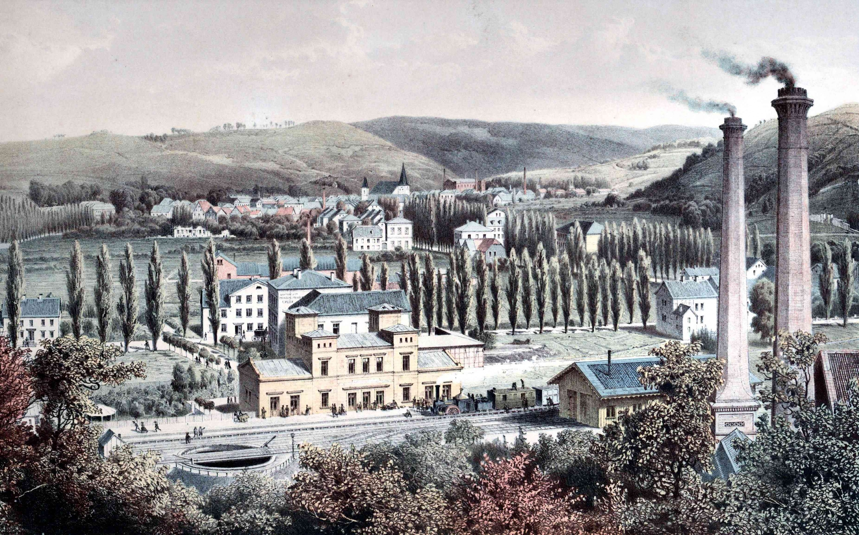 Bahnhof Hagen. Lithografie, Vorlagenerstellung Wilhelm Riefstahl, gedruckt 1860 in Wuppertal-Elberfeld. – Die im Werk „Bilder aus Westphalen“ von Levin Schücking veröffentliche Lithografie zeigt den im Dezember 1848 durch die Bergisch-Märkische Eisenbahn-Gesellschaft eröffneten ersten Bahnhof von Hagen. Rechts die Schornsteine der Firma Funcke und Elbers. – Herkunft/Rechte: Stadtmuseum Hagen / Heike Wippermann (RR-R).